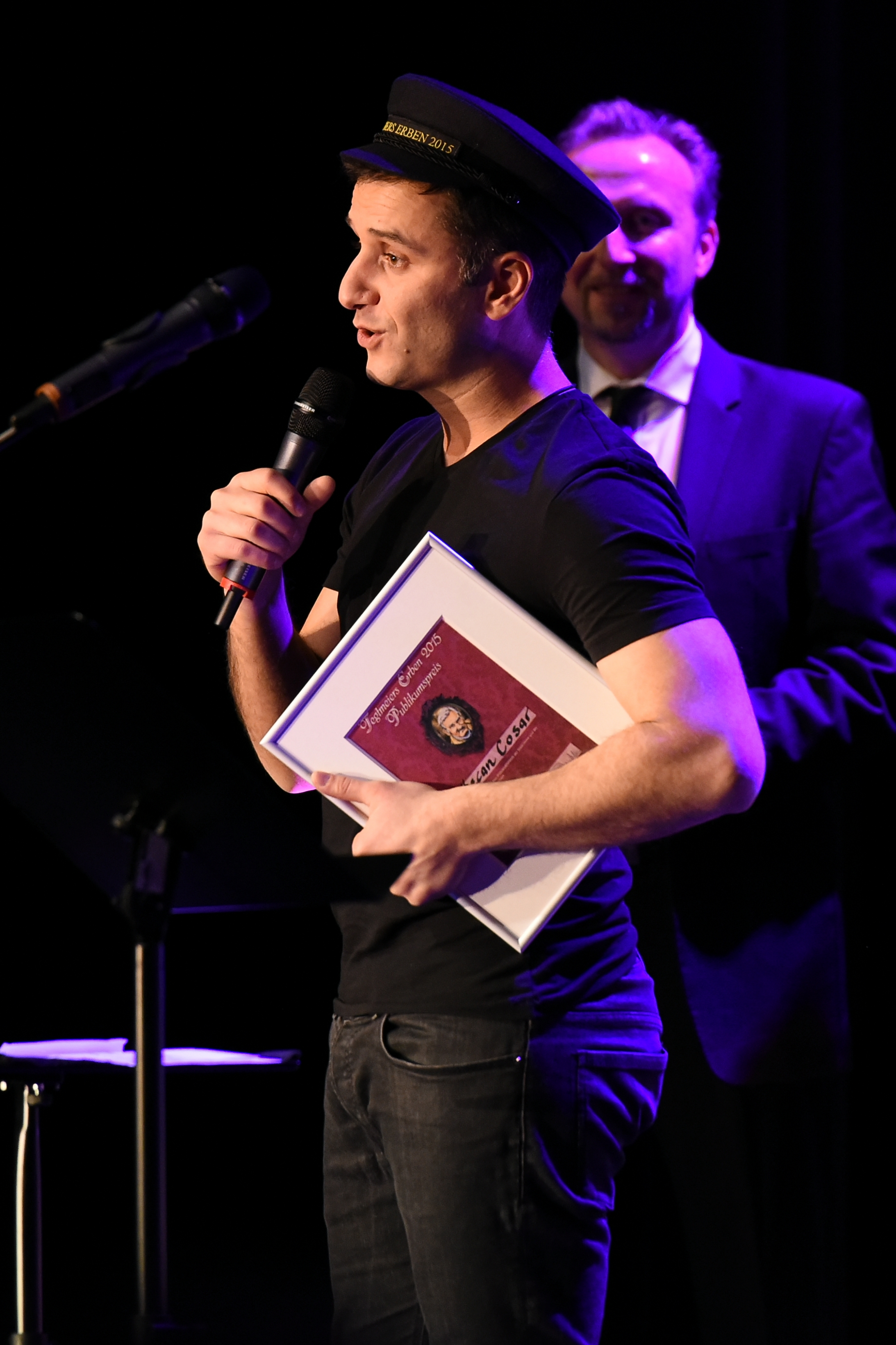 Özcan Cosar, Publikumspreisträger bei Tegtmeiers Erben 2015 im Kulturzentrum Herne.